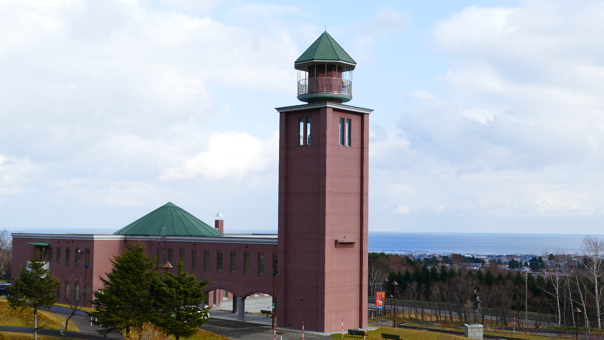 北海道枝幸町にあるミュージアム。枝幸町の動植物を含め歴史が確認できます。 Panasonic Lumix DMC-FZ1000